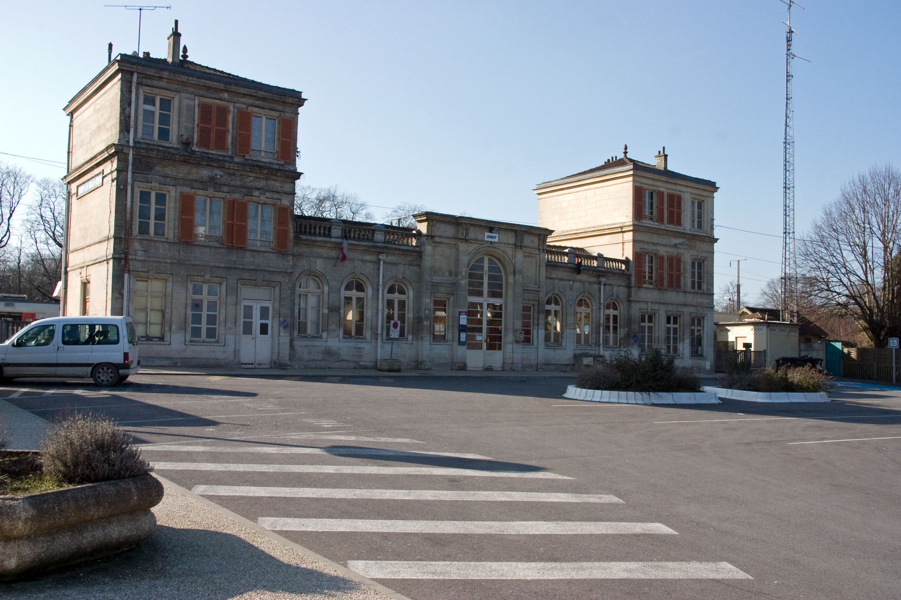 Gare d'Orry-la-Ville - Coye, Orry-la-Ville, département de l'Oise (France)